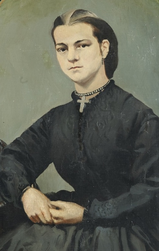 Portrett av Anna Henriette Paus, f. Wegner (1841–1918), olje på lerret Inventarnr. OMu.k00040 Signatur: E.E. 1916 Eier: Oslo Museum